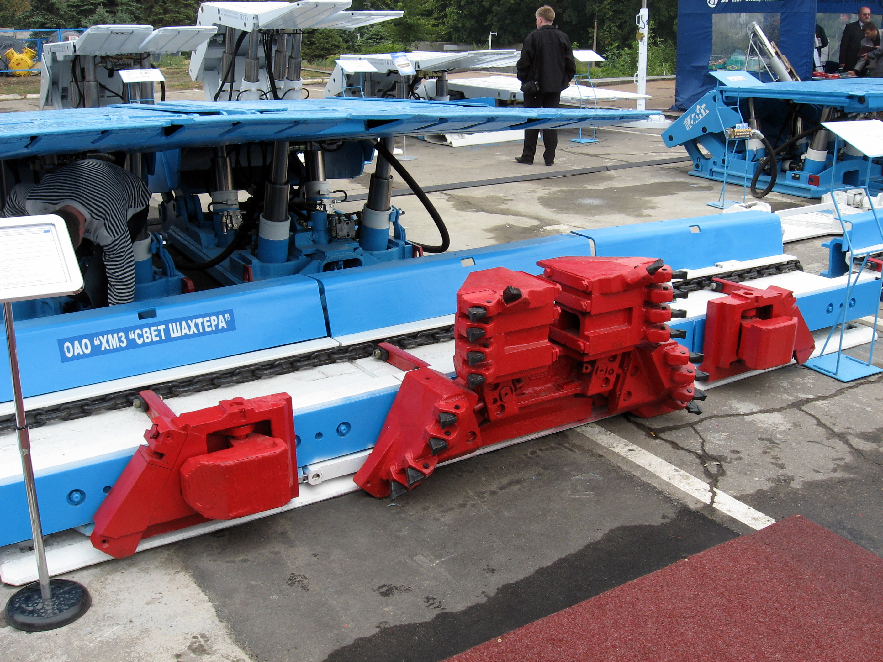 Фото з виставки Вугілля-Майнінг 2010